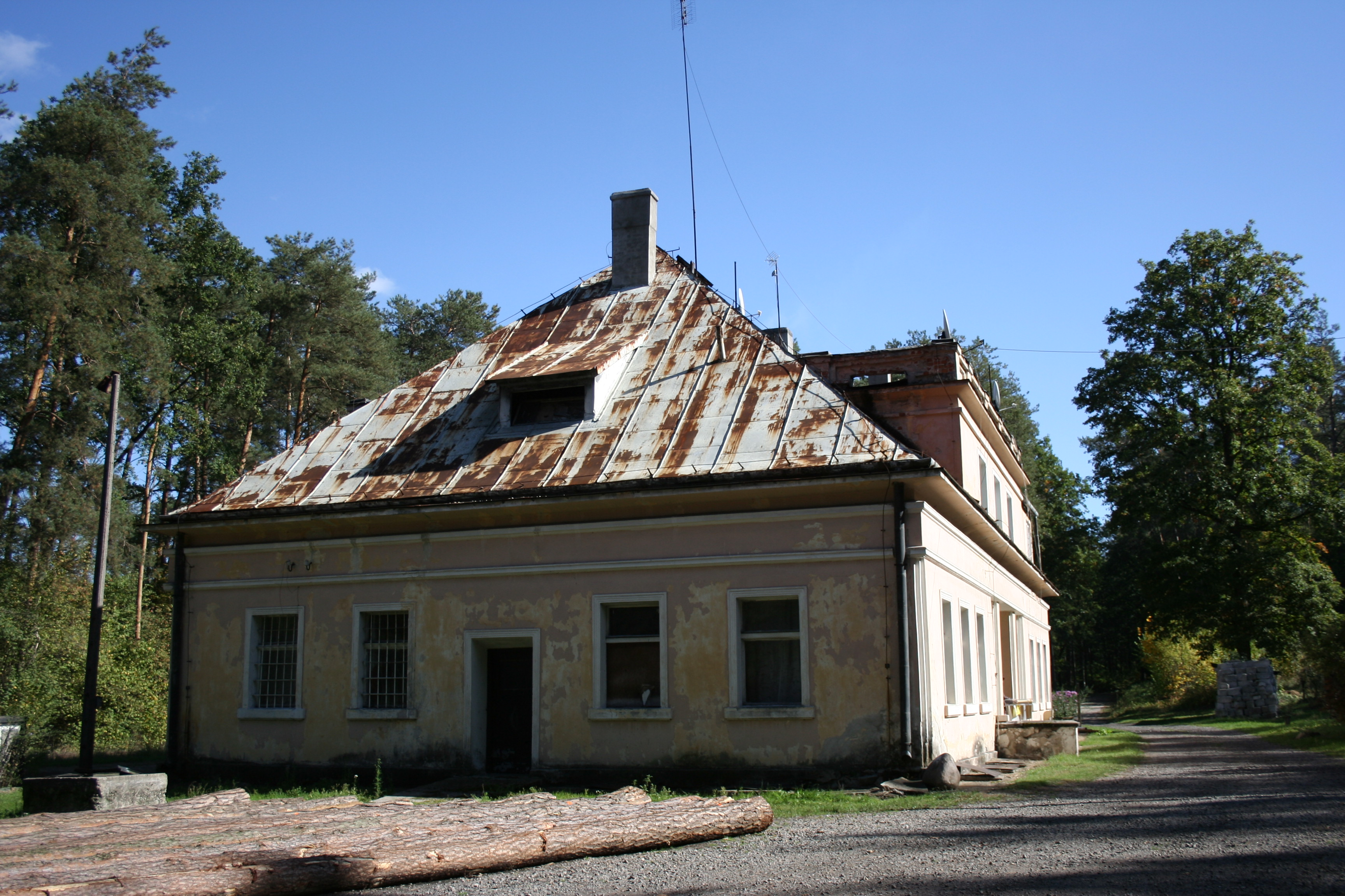 Dworzec kolejowy (1953), ob. dom mieszkalny w zespole Nałęczowskiej Kolei Dojazdowej Poniatowa, ul. Kolejowa 2